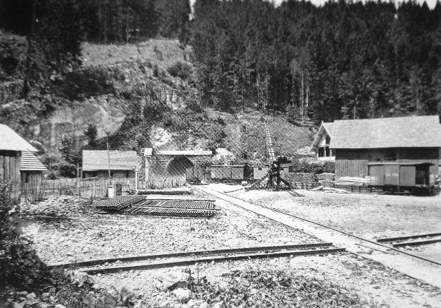 Les Convers 1874, die Strecke der Jura bernois ist im Bau.